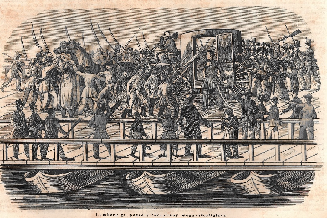 Lamberg gr. pozsonyi főkapitány meggyilkoltatása. Mulattató Képesujság, 1848/37, október 7.